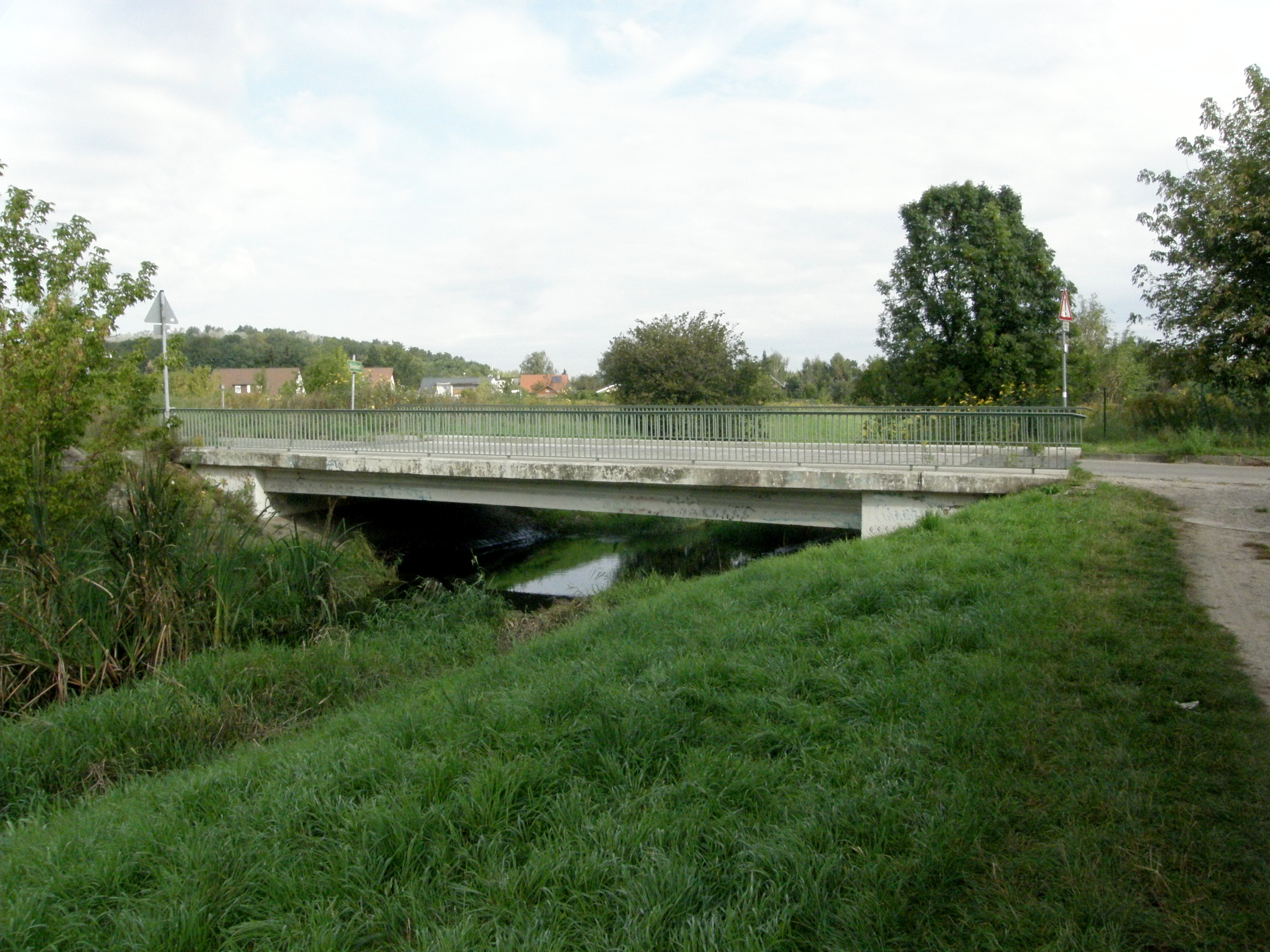 Berlin-Kaulsdorf, Mosbacher Straße über Wuhlebrücke